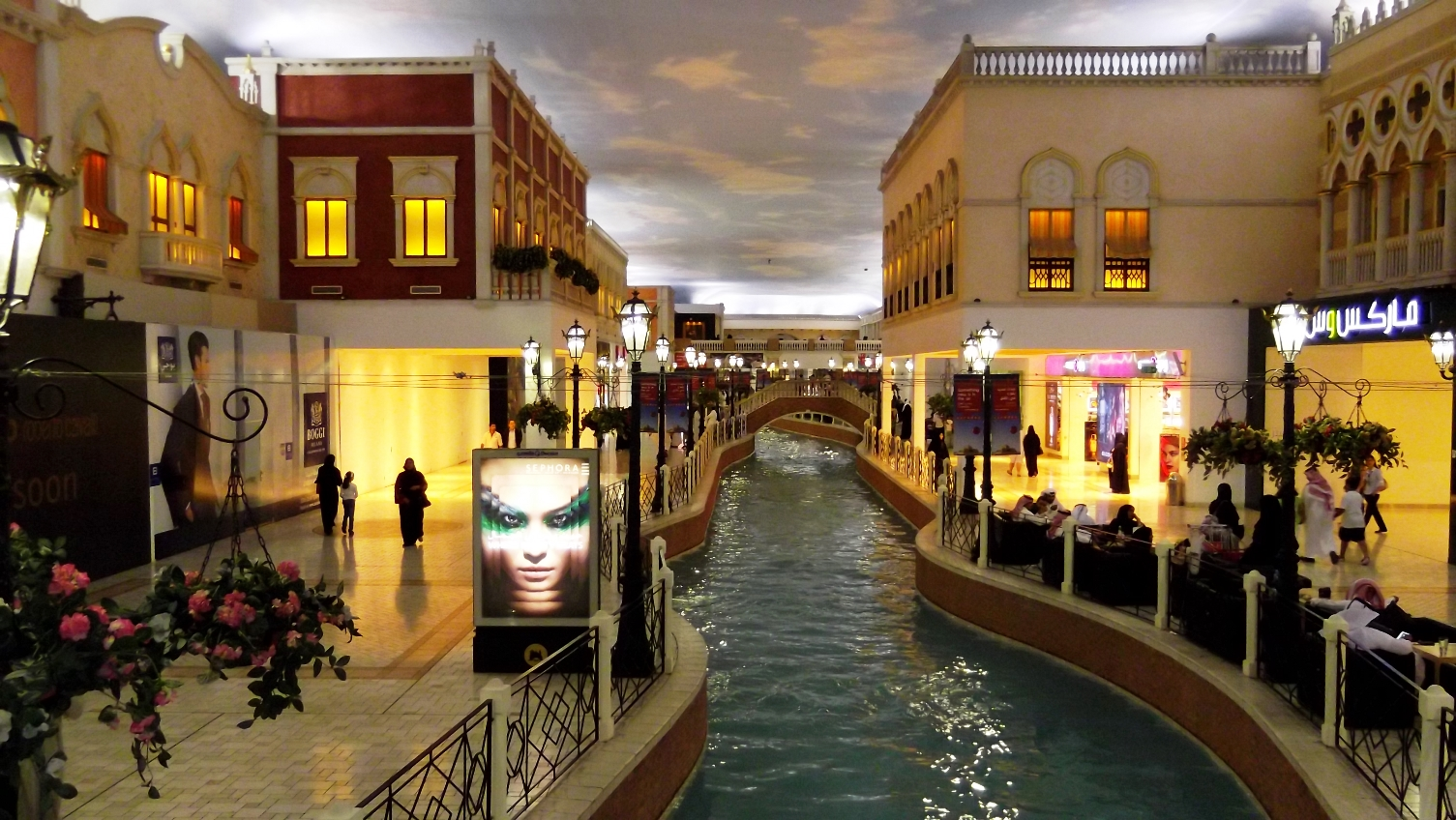 Villagio Mall, Aspire Park, Doha